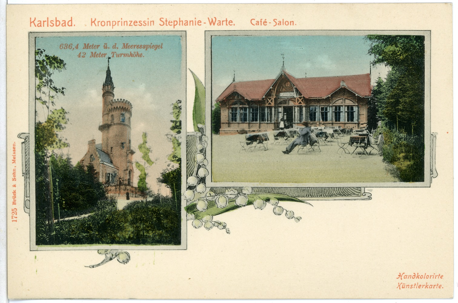 Karlsbad; Stephanie Warte, Cafe-Salon This postcard is from publisher Brück & Sohn in Meißen ( postcard has a unique number 01725 and is available in a higher resolution at the publisher. This images was uploaded in a cooperation project between Wikipedians and the publisher.